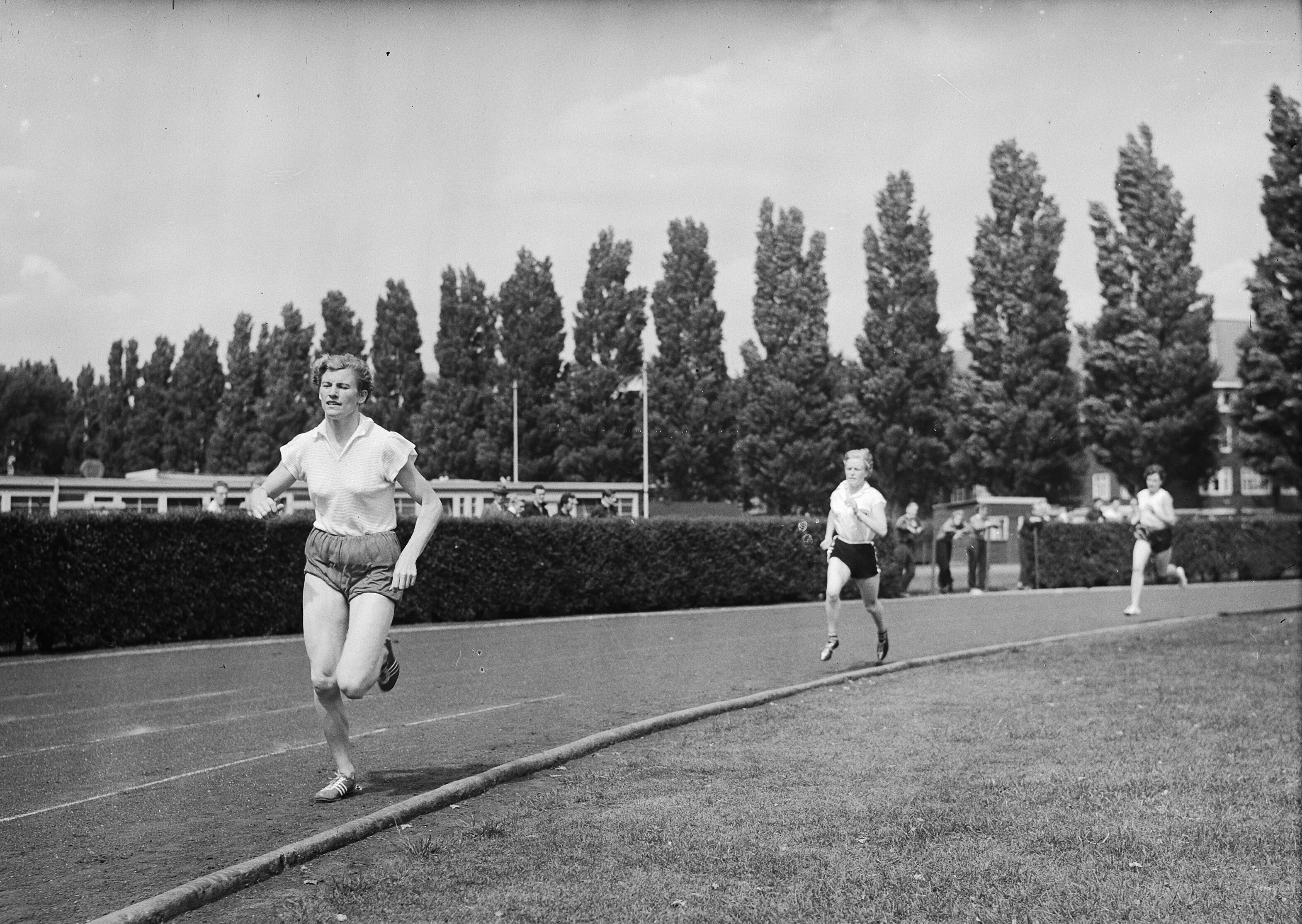 Collectie / Archief : Fotocollectie Anefo Reportage / Serie : [ onbekend ] Beschrijving : Nederlands Jeugdkampioenschappen Atletiek op Sintelbaan Amsterdam. Gre de Jong gaat door de finish (Sagitta) Datum : 12 juli 1953 Locatie : Amsterdam, Noord-Holland Trefwoorden : RECORDS, atletiek, finish Persoonsnaam : Gre de Jong, Sagitta Fotograaf : Duinen, […] van / Anefo Auteursrechthebbende : Nationaal Archief Materiaalsoort : Glasnegatief Nummer archiefinventaris : bekijk toegang 2.24.01.09 Bestanddeelnummer : 934-5511